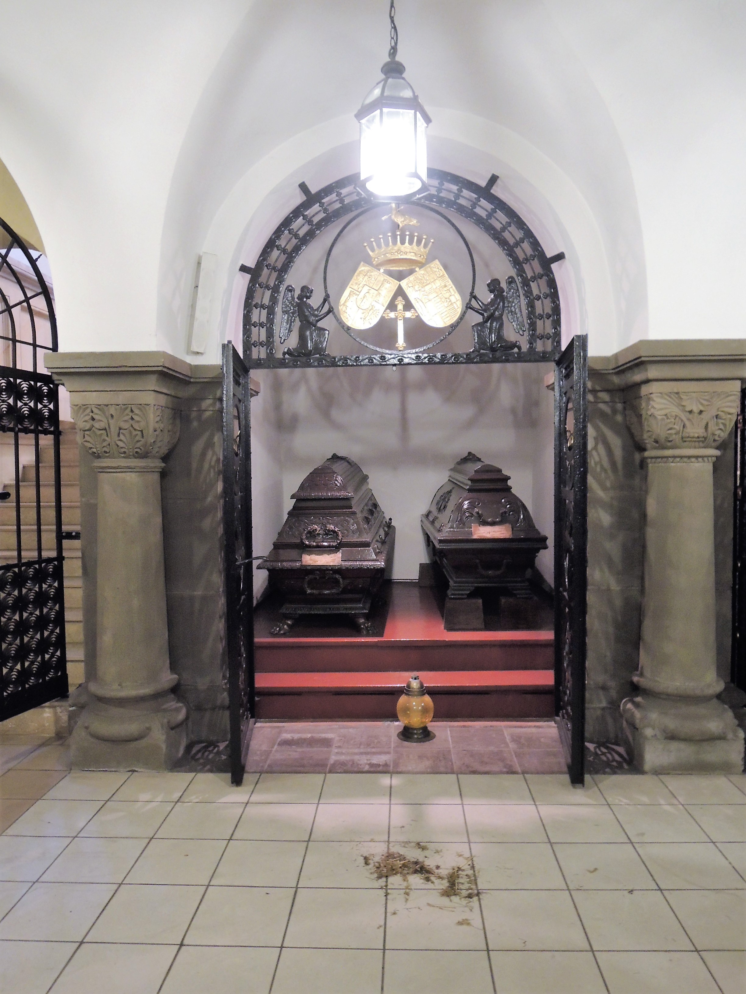 Kościół pw. św. Józefa w Rudzie Śląskiej, wybudowany z fundacji hrabiego Franciszka Ksawerego von Ballestrema w latach 1902-1904 według projektu Augusta Menkena z Berlina - krypta